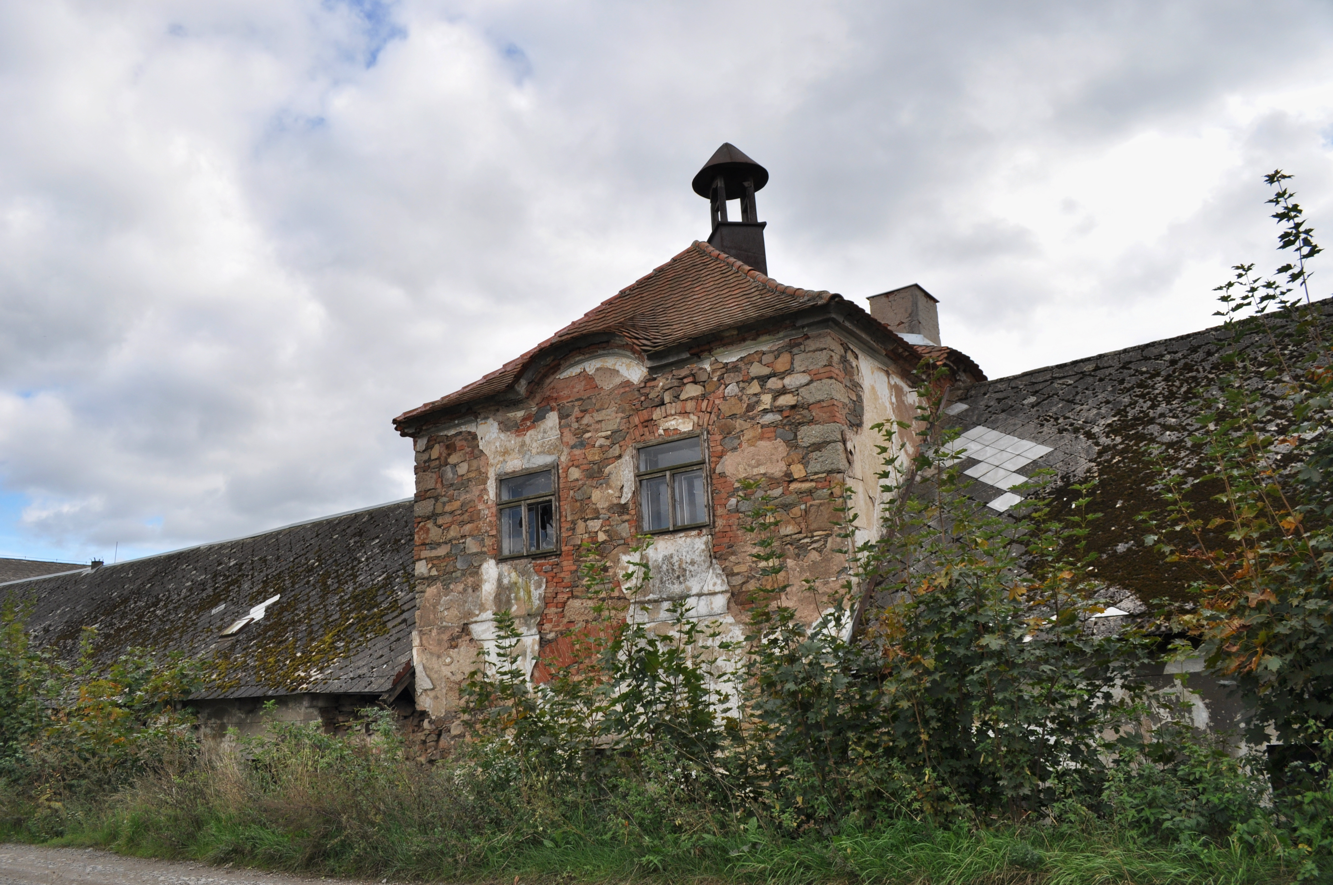 Zámeček Černá Hať